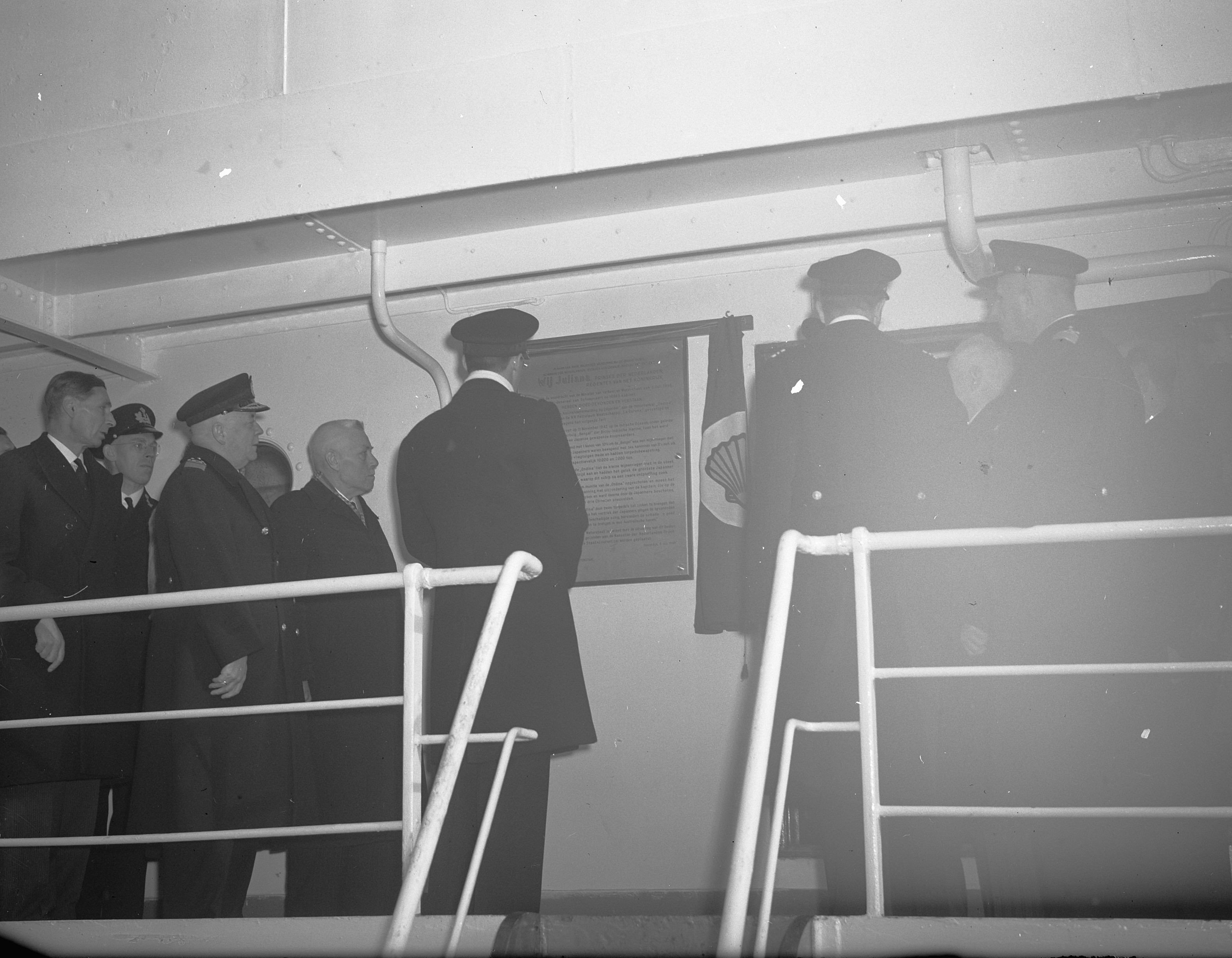 Collectie / Archief : Fotocollectie Anefo Reportage / Serie : [ onbekend ] Beschrijving : Prins Bernhard onthult gedenkplaat op de "Ondine" Datum : 8 november 1948 Trefwoorden : gedenkplaten, onthulling Persoonsnaam : Bernhard, prins Fotograaf : Averink, […] / Anefo Auteursrechthebbende : Nationaal Archief Materiaalsoort : Glasnegatief Nummer archiefinventaris : bekijk toegang 2.24.01.09 Bestanddeelnummer : 903-0892 Reacties Geplaatst door Maaike op 27 augustus 2014 - 10:09. de juiste schrijfwijze van het schip is: "Ondina" Locatie: Parkkade Plaats: Rotterdam, Zuid-Holland NB. De Ondina was op 9 juli van dat jaar de Koninklijke Vermelding bij Dagorder toegekend en op 8 november werd de tekst van dat besluit voorgelezen door de koningin. Daarna onthulde Prins Bernhard aan de achterzijde van de brug een bronzen gedenkplaat met daarop vermeld de onderscheiding die het schip en daarmee haar bemanning ten deel was gevallen.